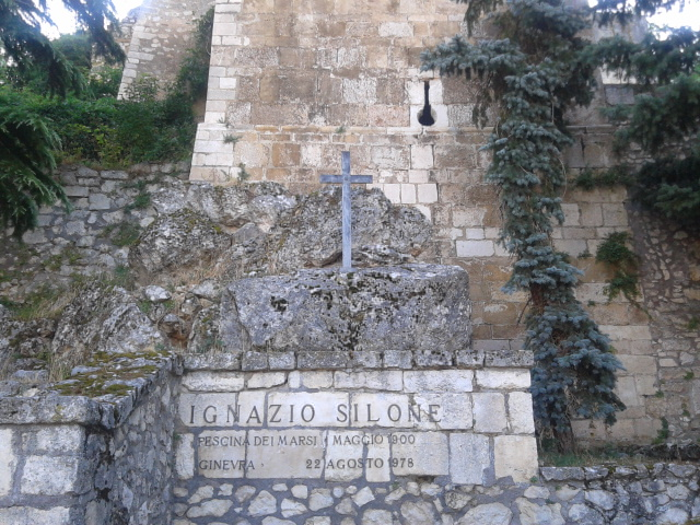 La tomba di Ignazio Silone alla base della torre di San Berardo